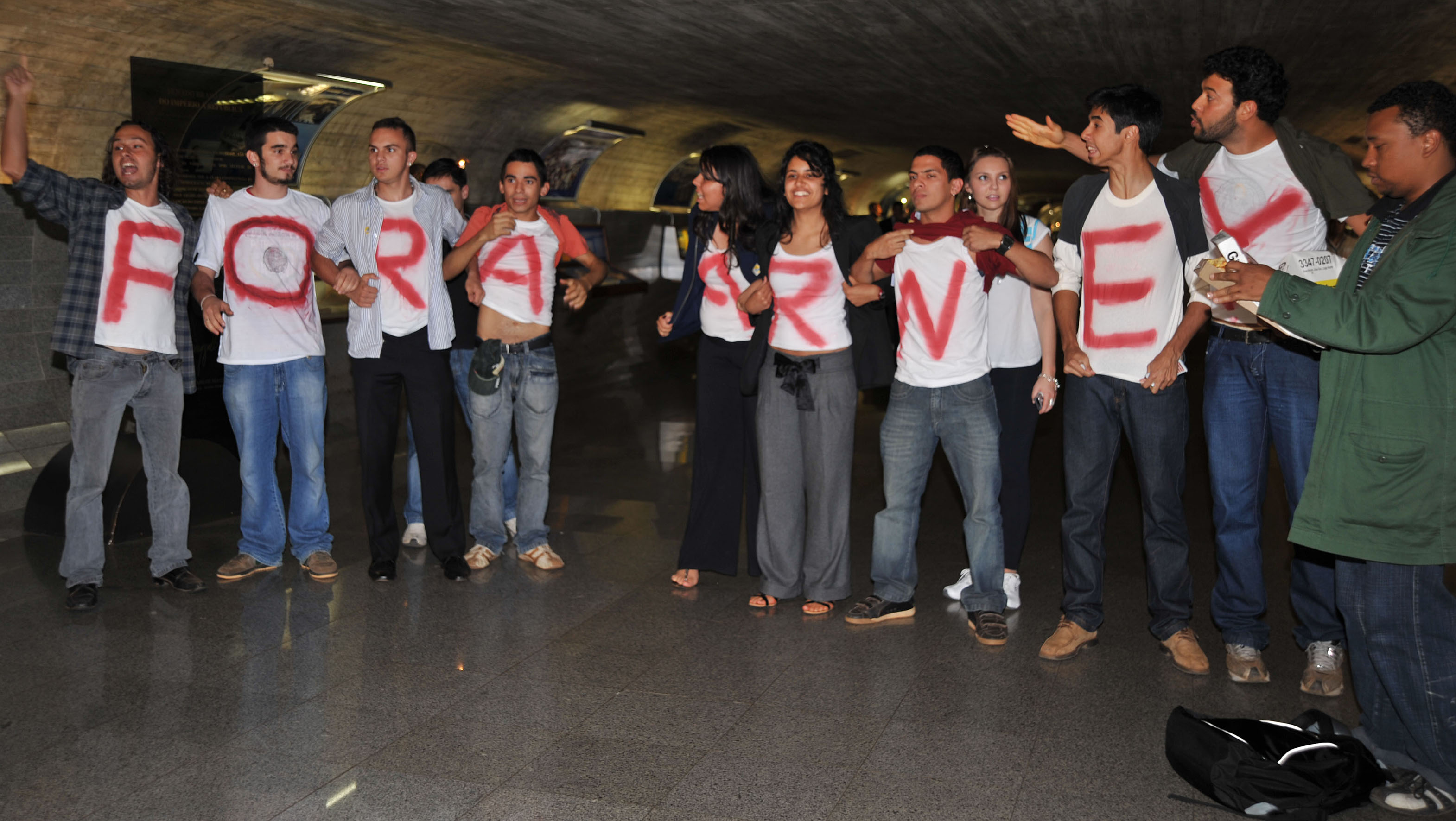 Usando camisetas que formam a frase "Fora Sarney", estudantes protestam contra permanência de José Sarney, na presidencia do Senado.